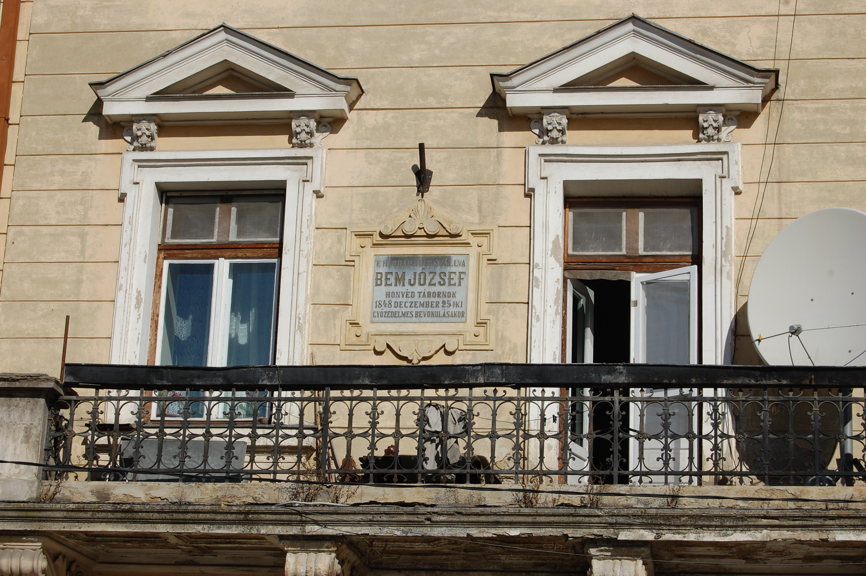 Balconul Casei Pataki-Teleki Cluj (str. Eroilor 1) cu placa memorială J. Bem, revoluţionar polonez, erou al Poloniei şi UngarieiRomână: Pataki-Teleki-ház Bem József emléktáblájávalRomână: Pataki-Teleki House with the memorial plaque of Józef Bem (Polish general, a national hero of Poland and Hungary)